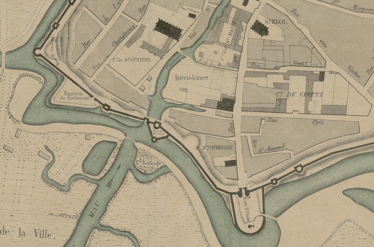 vue partille de la carte de chalons de 1755biliothèque pompidou de Châlons ES 17602 1.